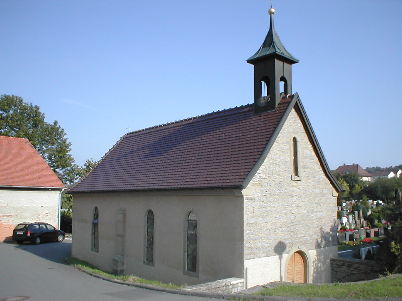 Friedhofskapelle in Neudenau